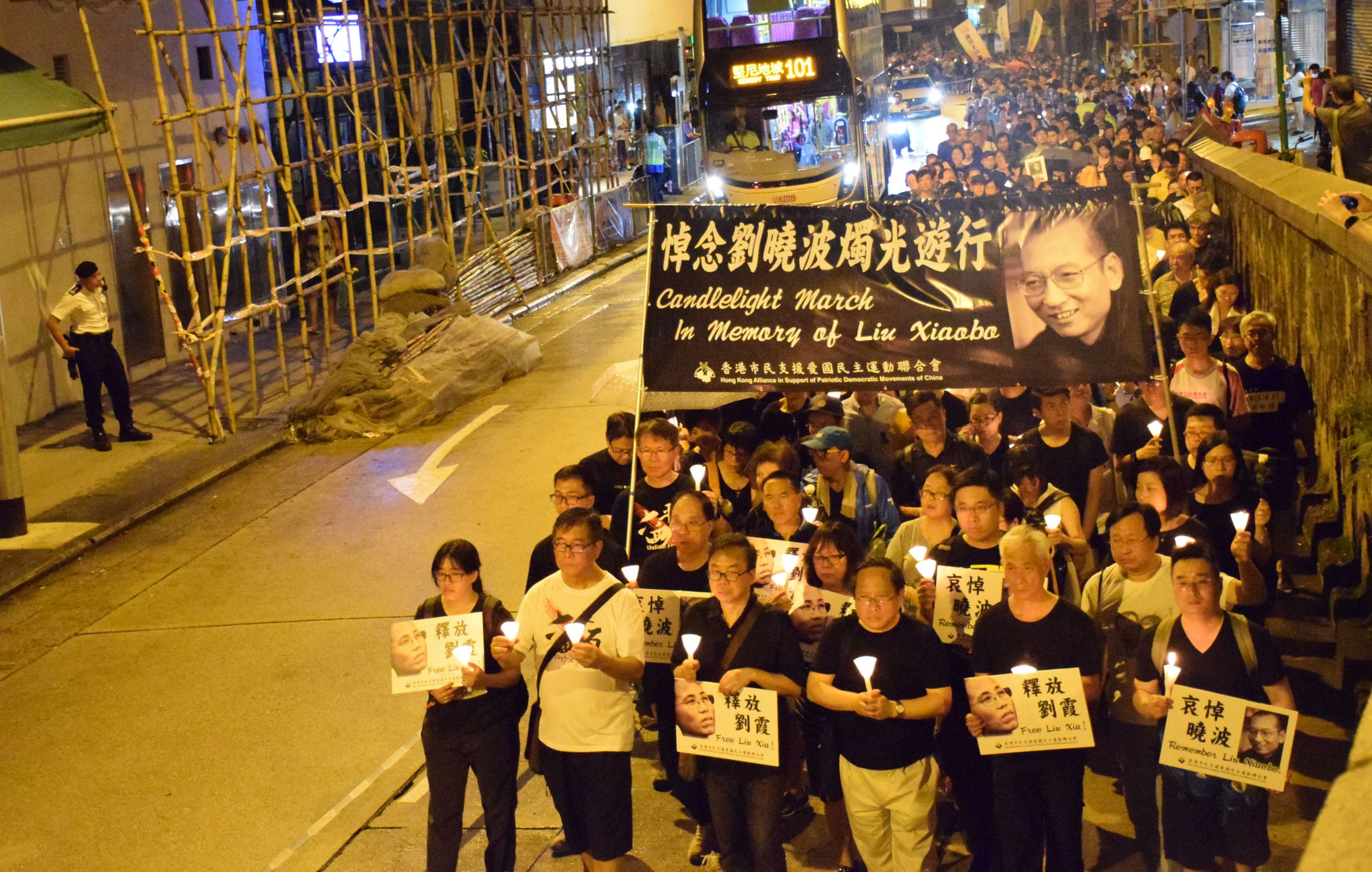 諾貝爾和平獎得主，中共民主運動綱領性文件《零八憲章》起草人之一、學者和作家劉曉波病逝。本圖集匯集關於劉曉波及其影響的照片，也包括人們的紀念，追憶，哀悼和抗議。 香港悼念劉曉波燭光靜默遊行(美國之音湯惠芸拍攝)